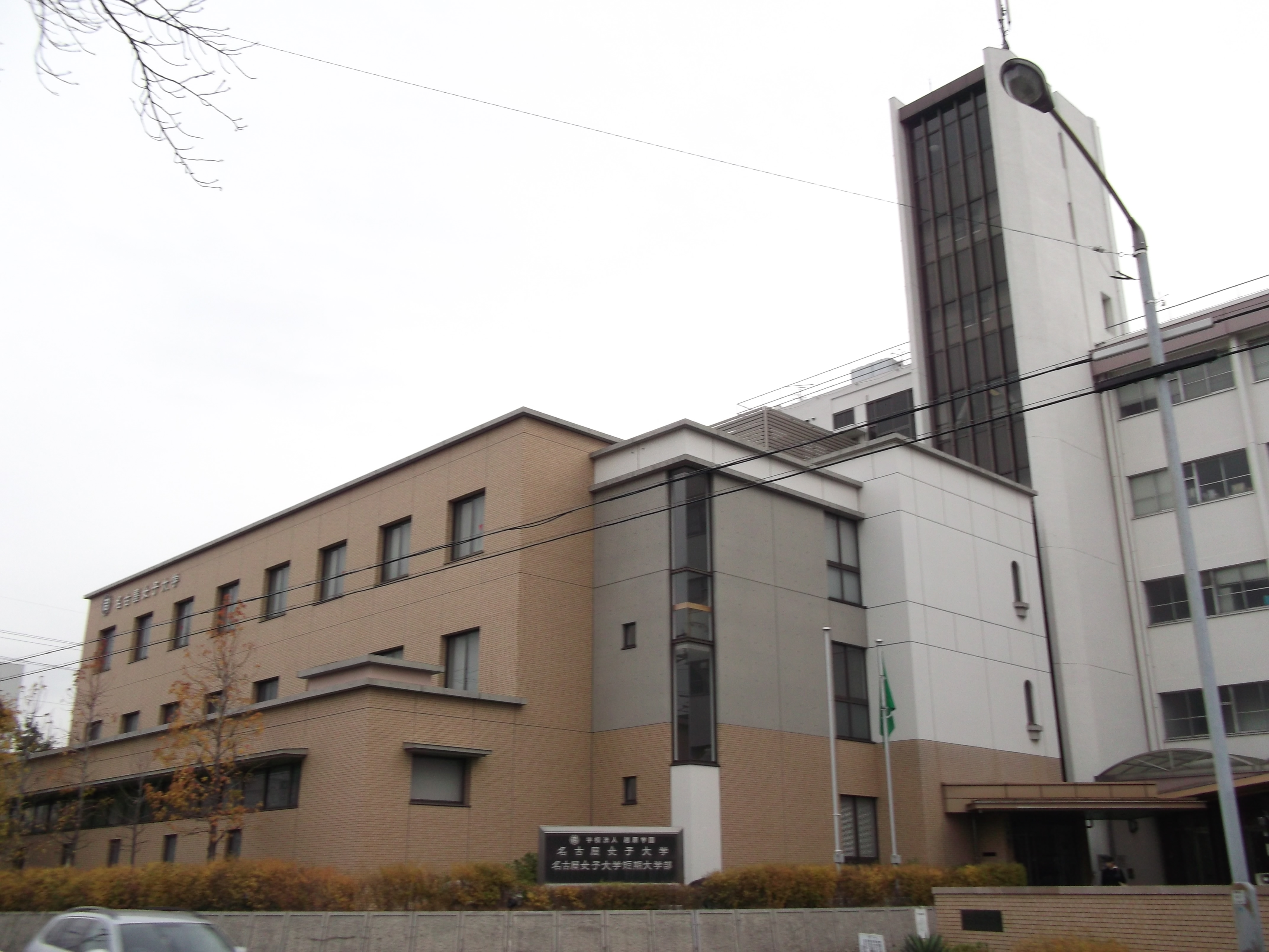 名古屋市瑞穂区汐路町の名古屋女子大学汐路学舎を北側から写す